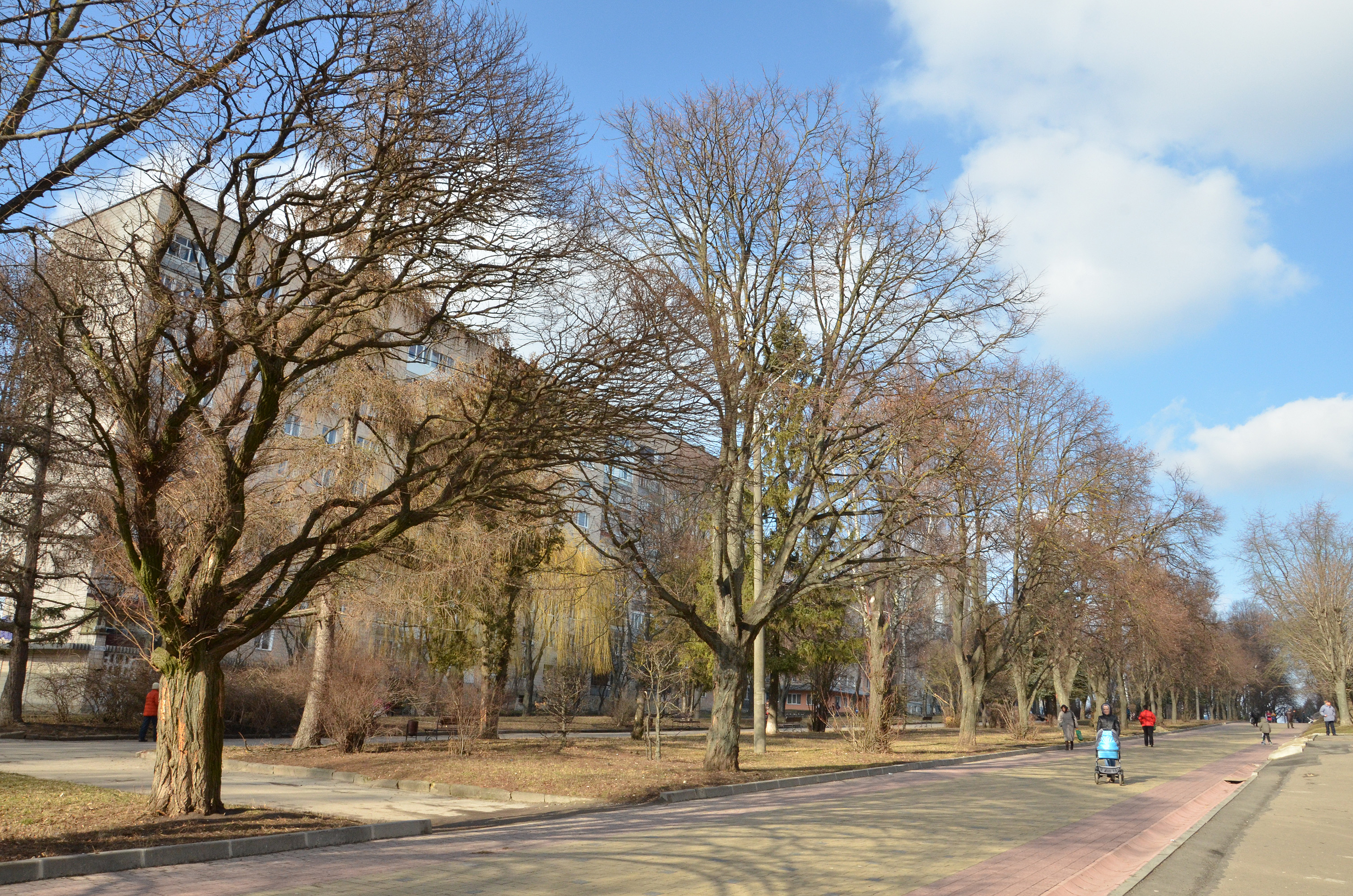 Бульвар Данила Галицького в Тернополі.